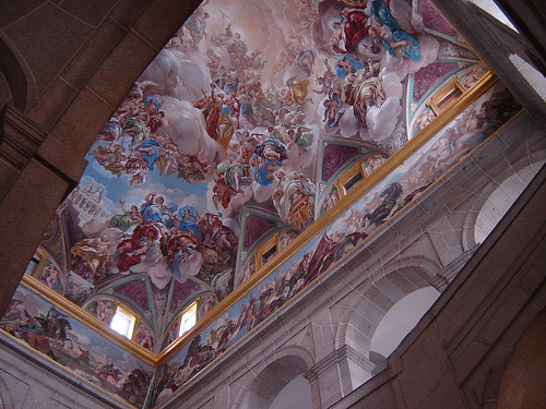 El techo de la escalera principal de San Lorenzo del Escorial